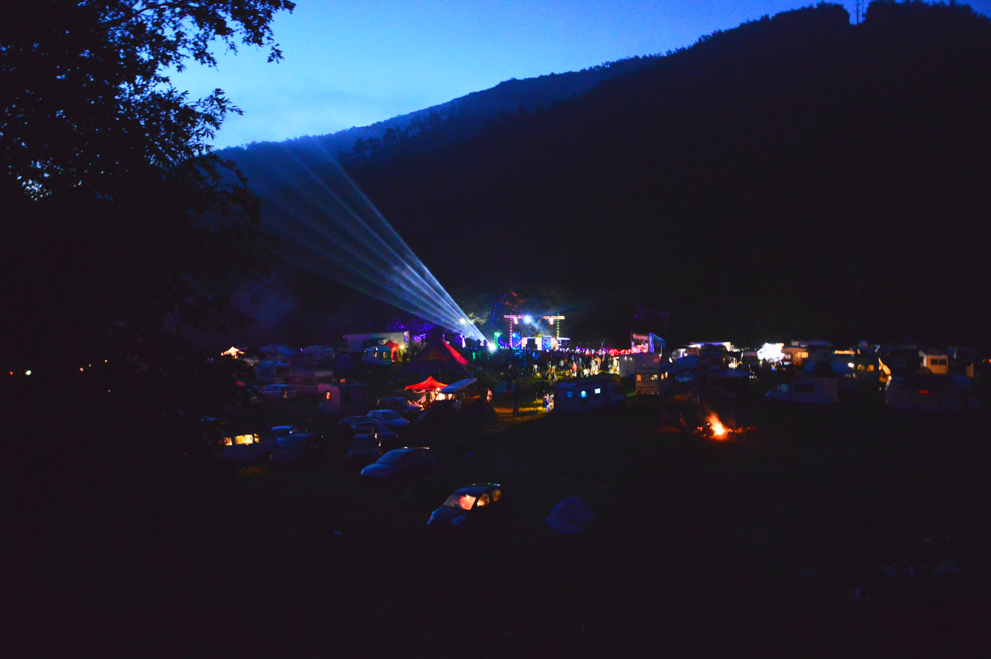 Free party all'aperto. Italia.